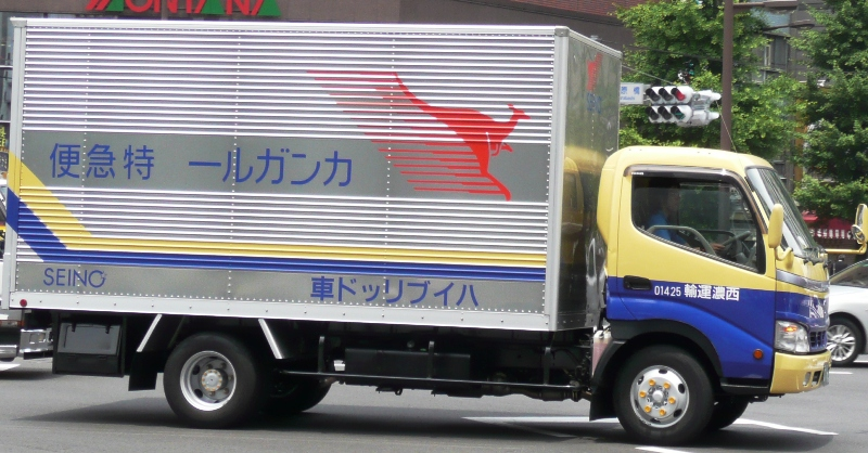 Hino Dutro Hybrid.